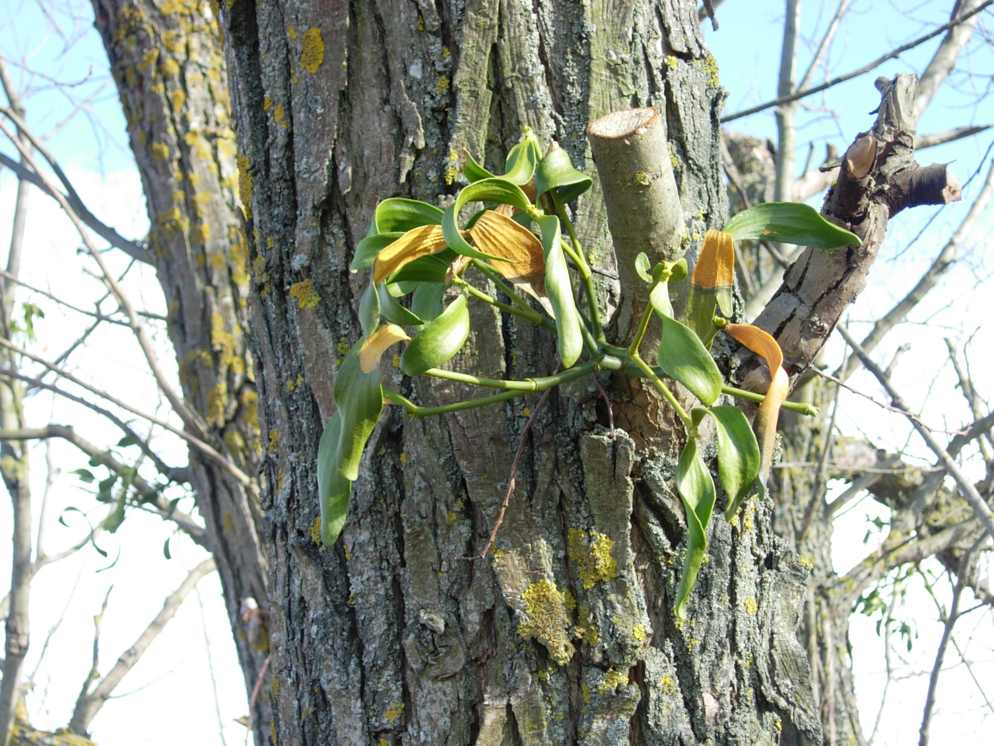 Омела белая, начальный период заражения